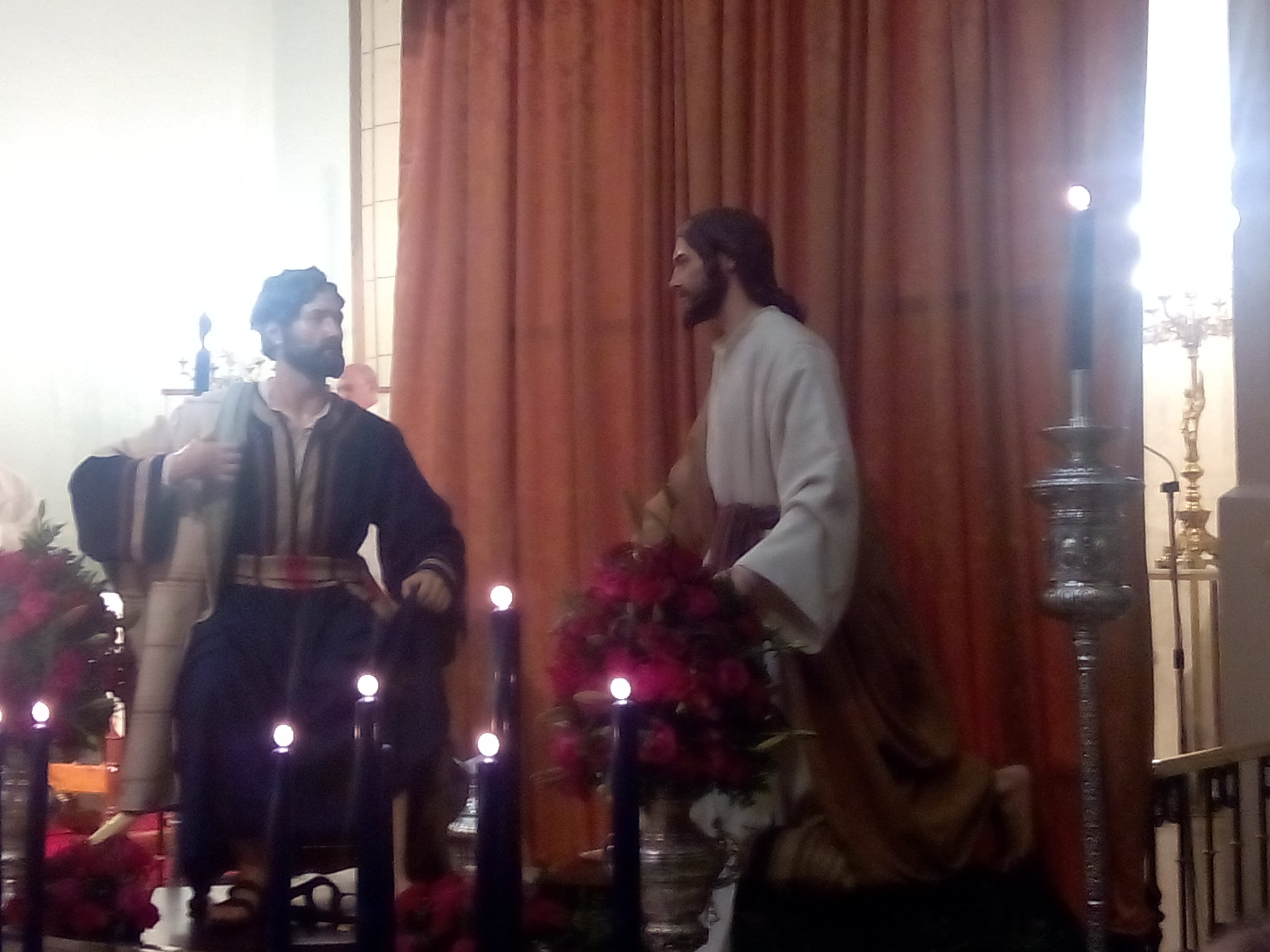 Imágenes de Cristo Divino Maestro y San Pedro de la Hermandad del Lavatorio de Jaén durante su bendición en la iglesia de la Merced.